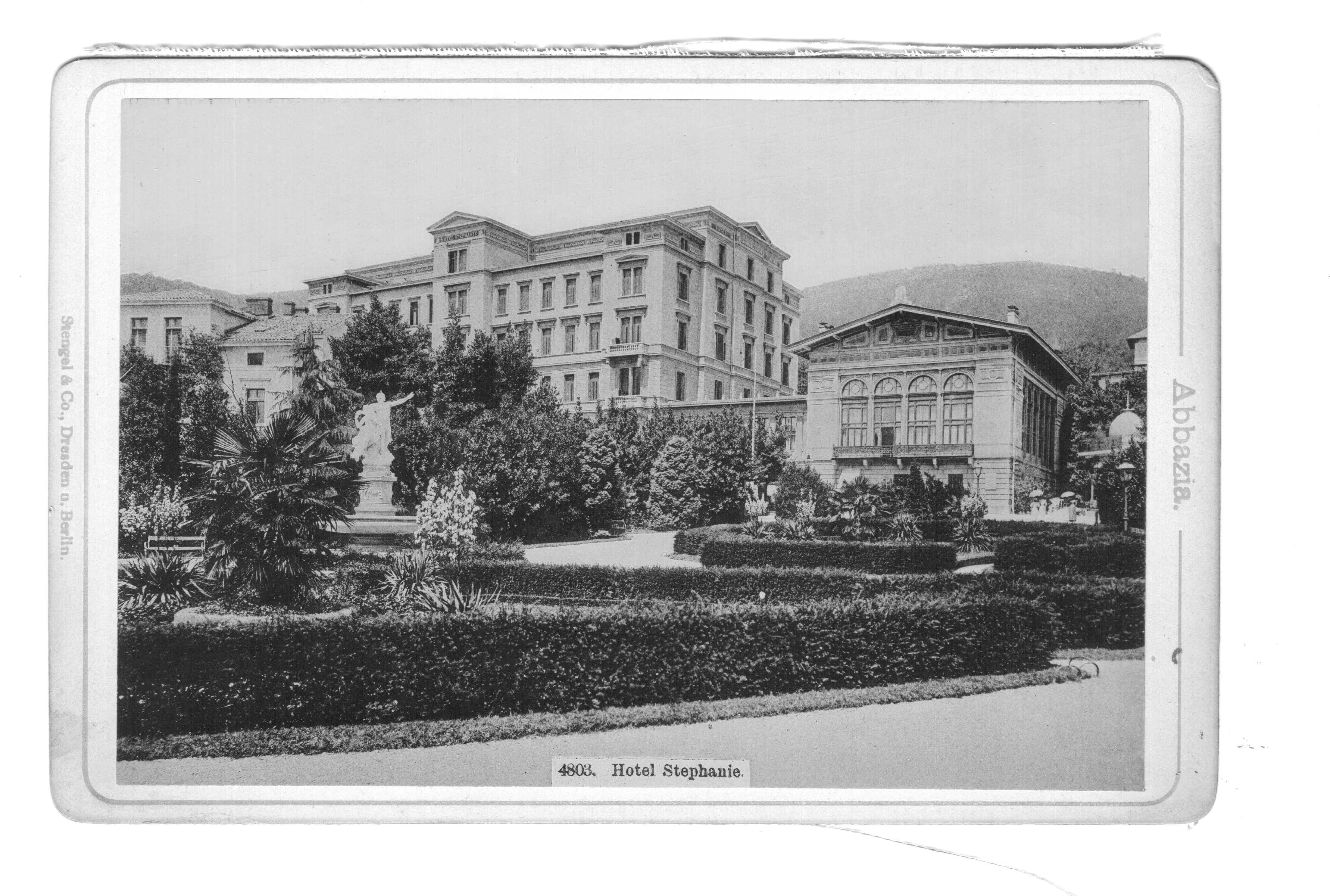 Ismeretlen fényképész PD-old. Osztrák-Magyar Monarchia, Abbázia. Az Abbázia című fényképalbum 20, fehér vászonnal összefűzött fényképpel. ©© Megjelent Creative Commons alatt a Metapolisz sorozatban. A Metapolisz sorozat valamennyi képe és filmje Creative Commons alatti valamint kereskedelmi - for profit - célra is felhasználható. Ajánlott hivatkozás: Derzsi Elekes Andor: Metapolisz DVD line ©© Published under Creative Commons in the Metapolisz DVD line. All of the photos and vids in the Metapolisz DVD line are under Creative Commons and can be used even for commercial – for profit – purposes. Recommended Citation Derzsi Elekes Andor: Metapolisz DVD line